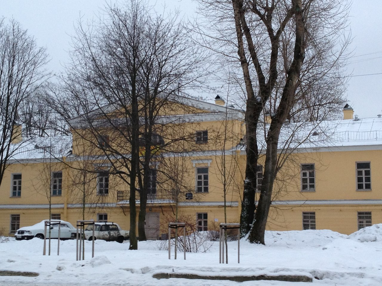 Фасад здания Благородного пансиона при Главном педагогическом институте, наб. Фонтанки, 164, Санкт-Петербург